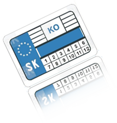 Pracovisko kontroly originality